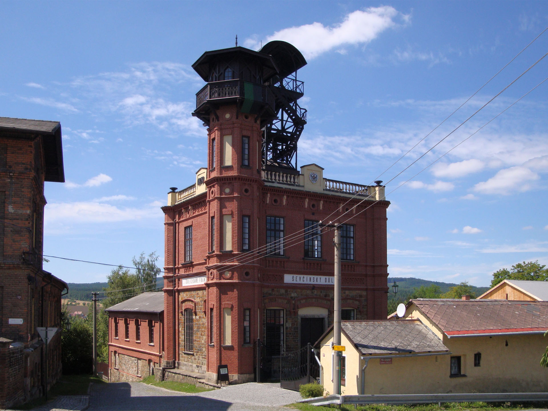 Pohled na důl Ševčín na Březových Horách v Příbrami